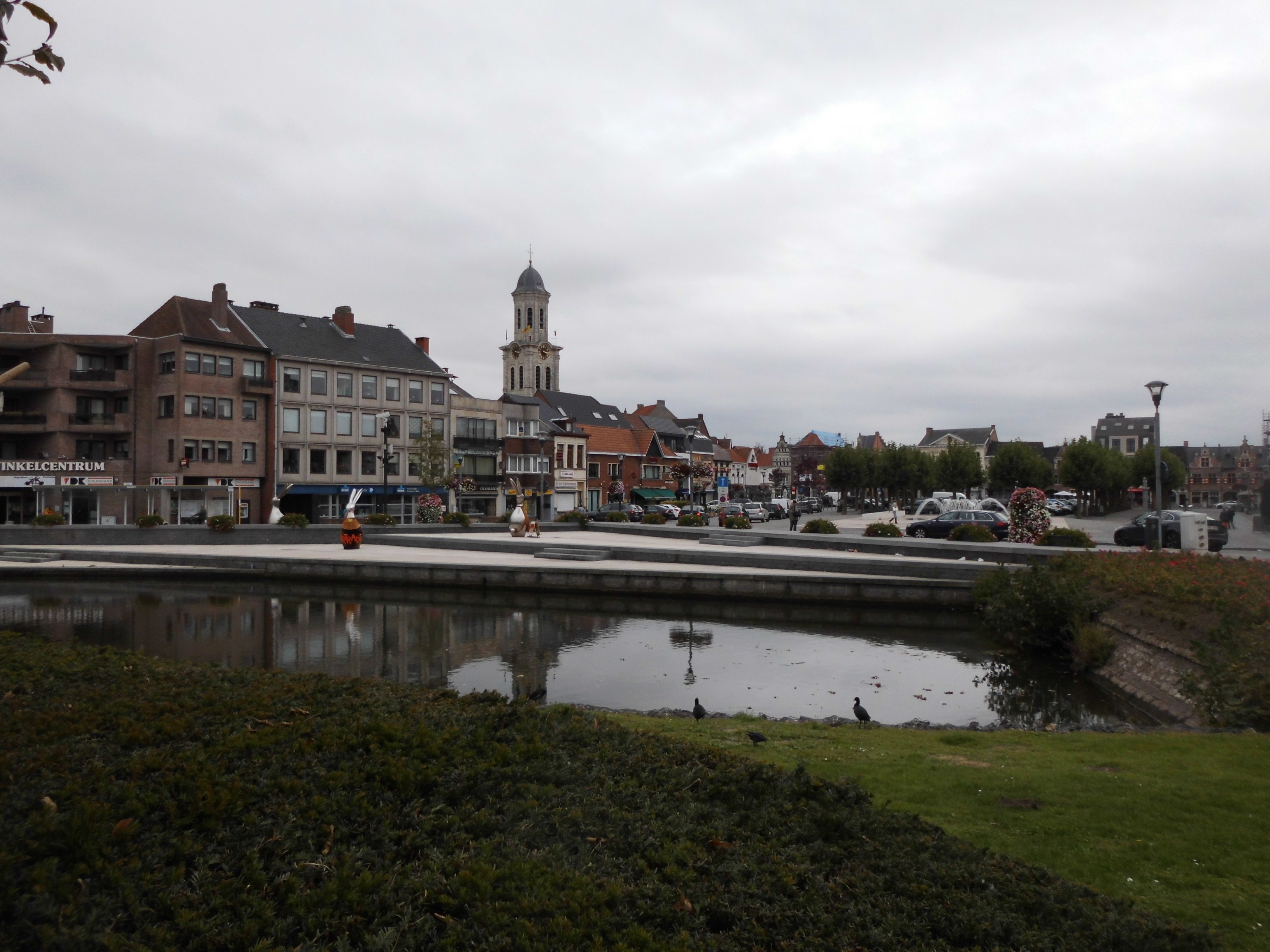 Centrum Lokeren - Oost-Vlaanderen - België